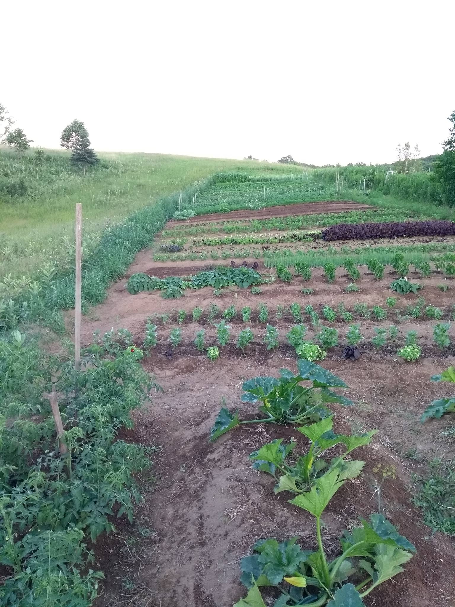 Micro agriculture